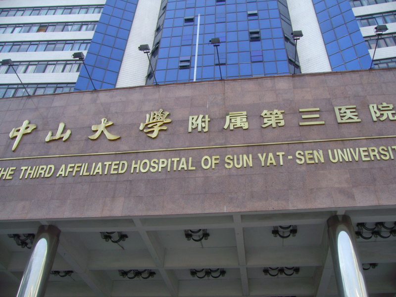 广州中山大学附属第三医院